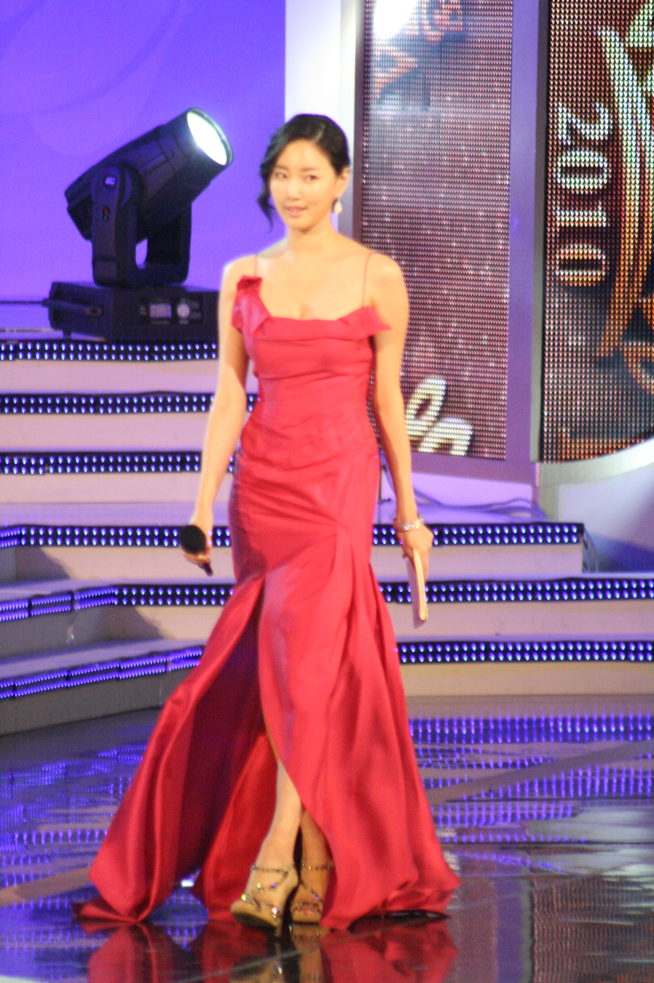 Miss Korea 2010 MC Kim Sa-Rang.